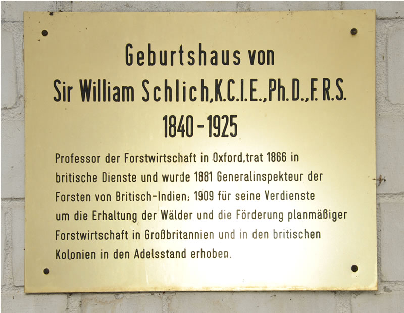 Geburtshaus von Sir William Schlich in Flonheim (Rheinhessen)- heute ev. Pfarrhaus